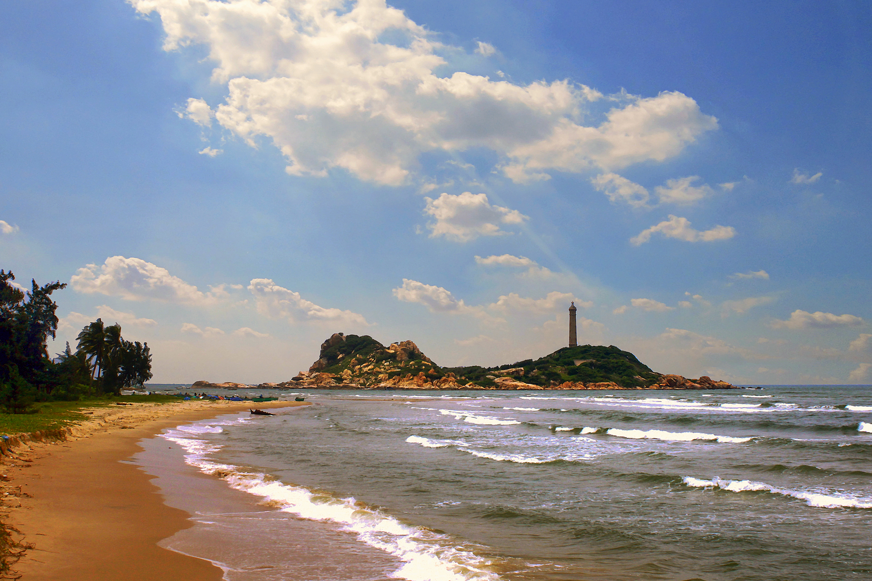 Hải đăng Kê Gà (nhìn từ xa) thuộc xã Tân Thành, huyện Hàm Thuận Nam, Bình Thuận, Việt Nam. Đây là ngọn hải đăng được trung tâm sách kỷ lục Việt Nam xác nhận là ngọn hải đăng cao nhất và cổ xưa nhất Việt Nam.